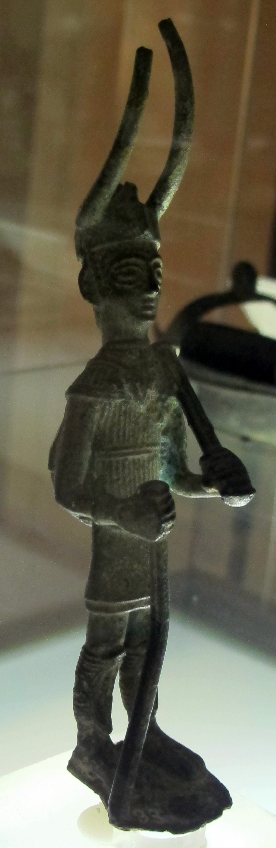 Museo archeologico nazionale (Firenze)